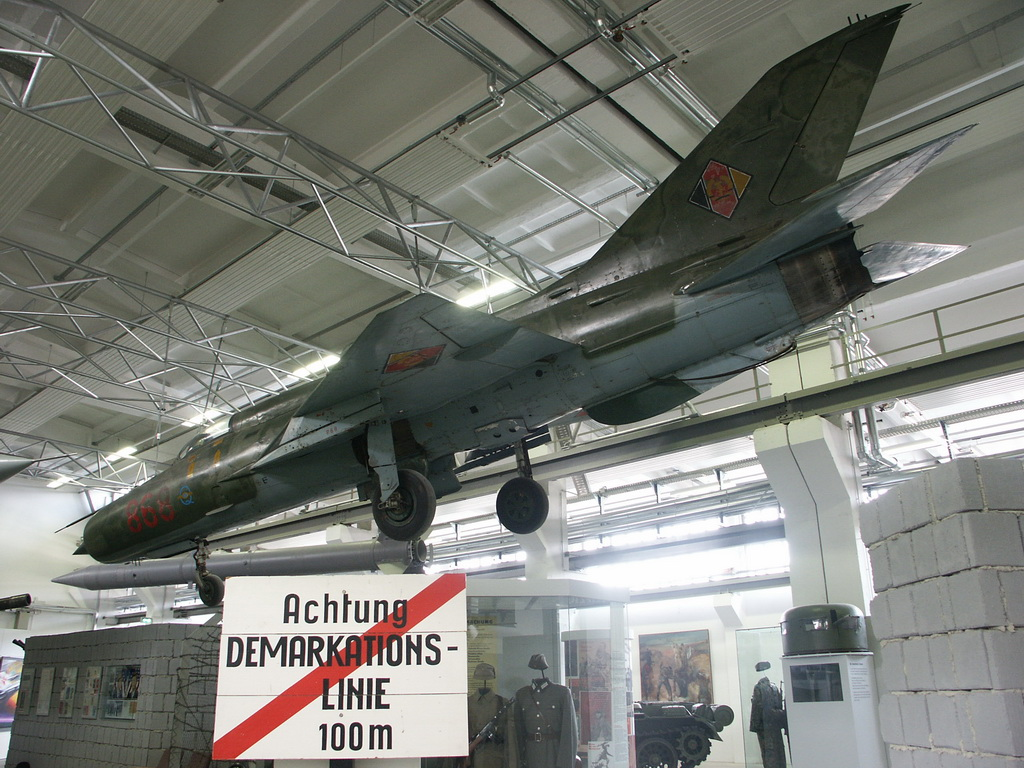 Bundeswehrmuseum Dresden mit Teilen von der NVA Remark: Mikoyan-Gurevich MiG-21PF.